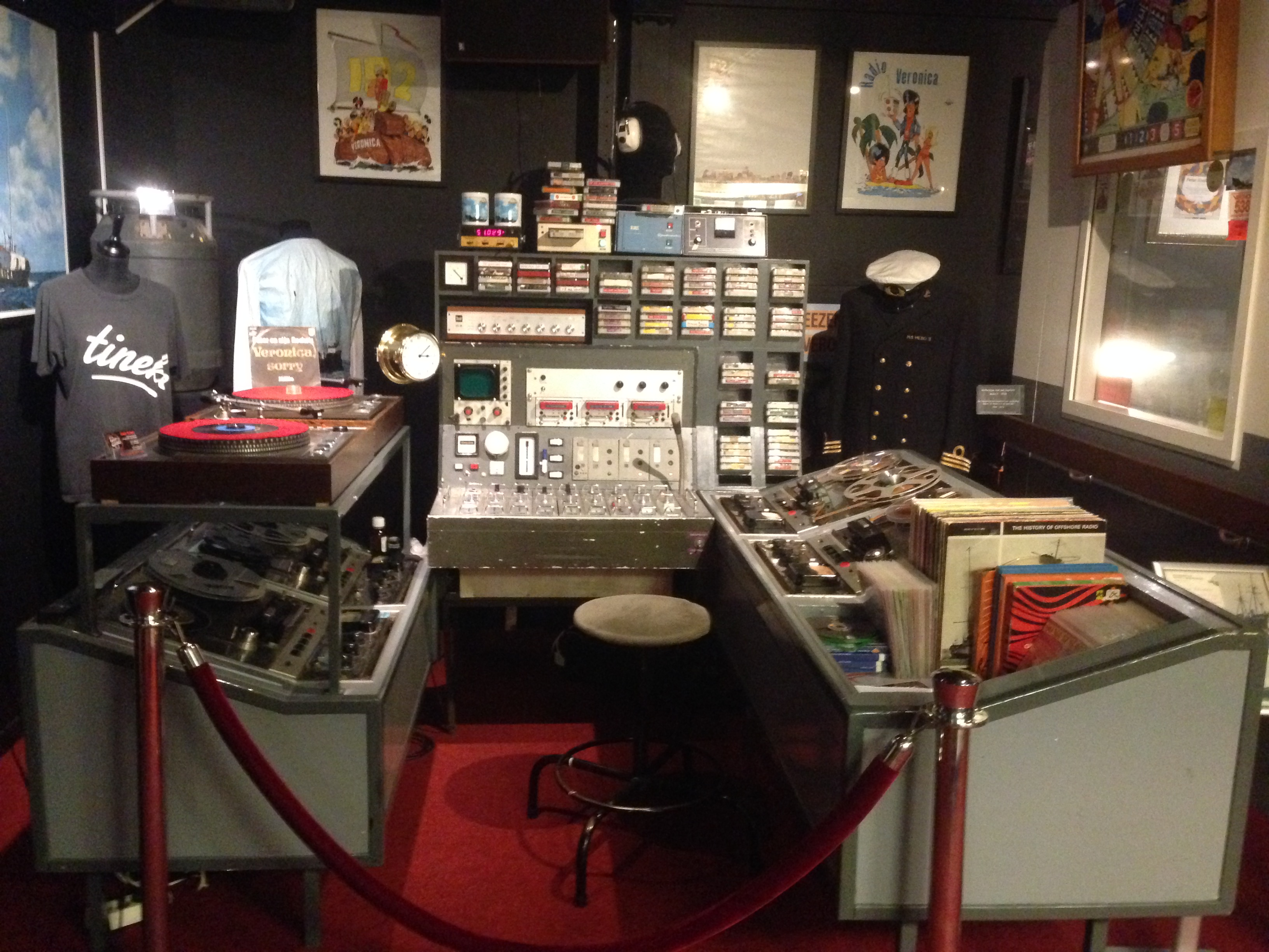 Museum RockArt, Hoek van Holland, Netherlands